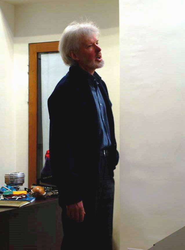 Lietuvos alpinistas Vladas Vitkauskas (VU paskaitoje)